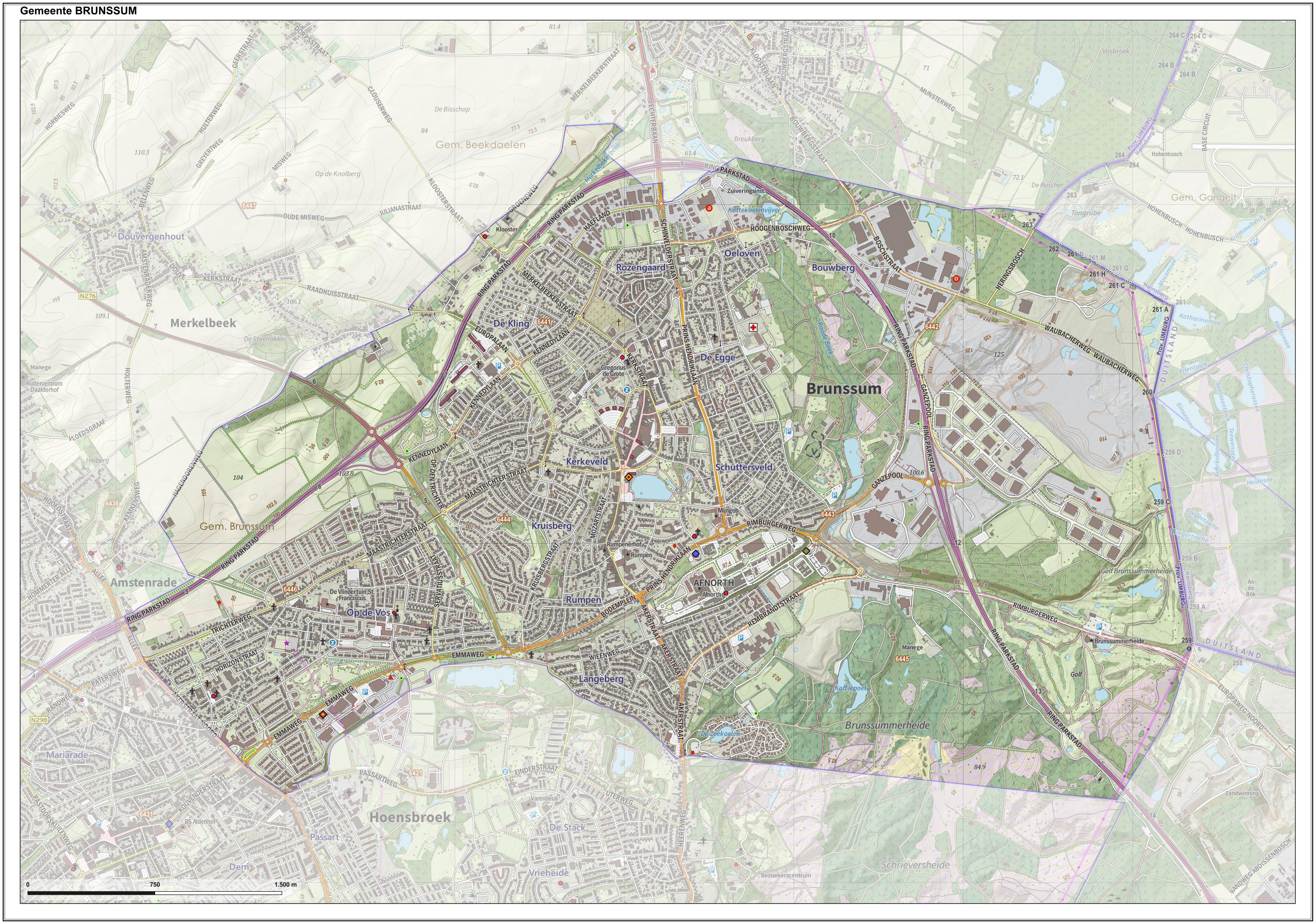 Topografische gemeentekaart. Resolutie: 400 pixels/km. Kaartbeeld samengesteld uit de open geodata van de Top10NL en Top25namen (Kadaster), Creative Commons-BY licentie. Gebouwvlakken uit open geodata BAG extract. Wegen uit de OpenStreetMap, OpenStreetMap community. Reliëfschaduw uit de Actuele Hoogtekaart AHN2. Samenstelling en kleurenschema: Jan-Willem van Aalst, met QGIS. Zie ook de Legenda.